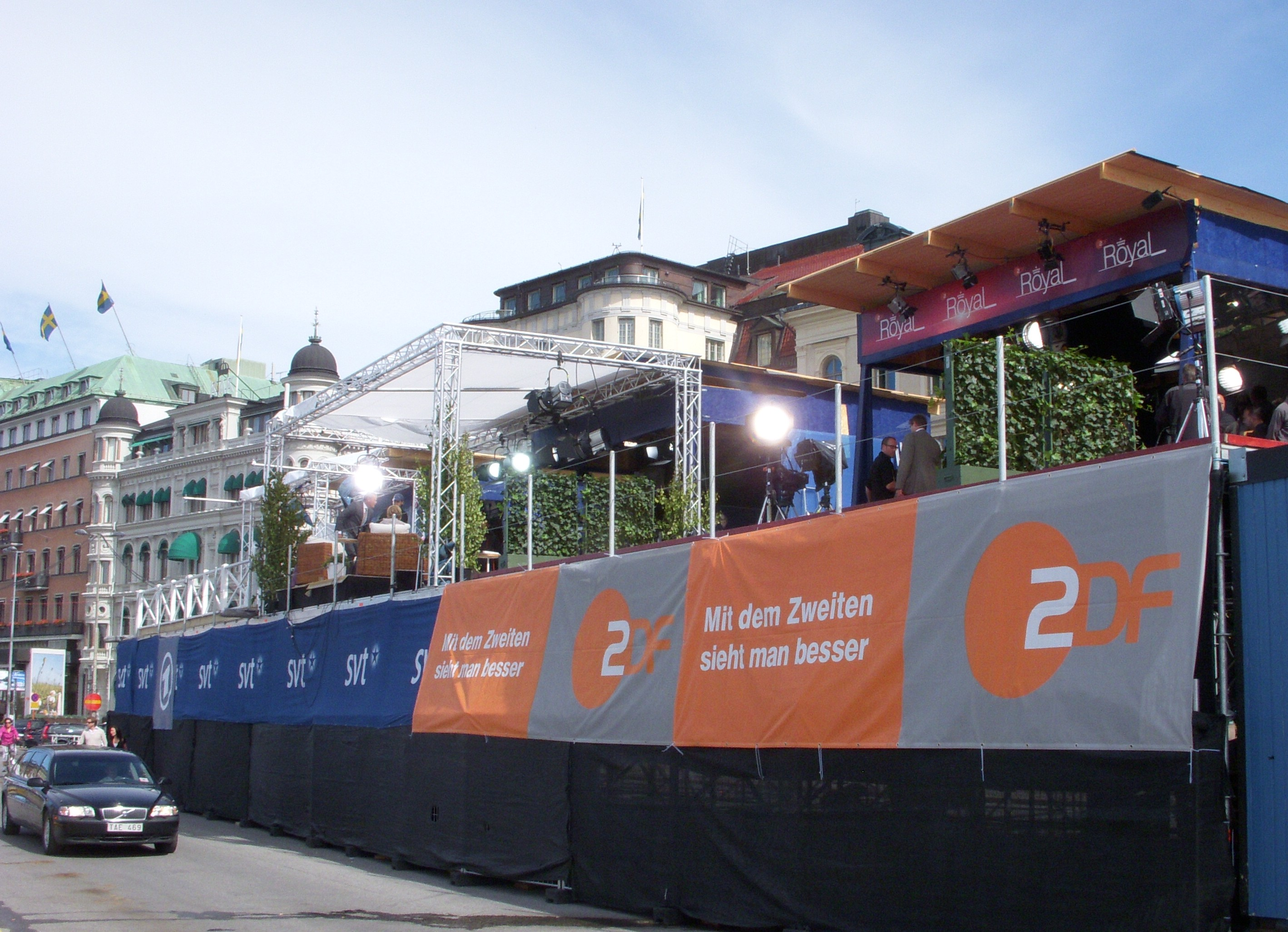 Mediebevakning Kungliga bröllopet, Stockholm 2010